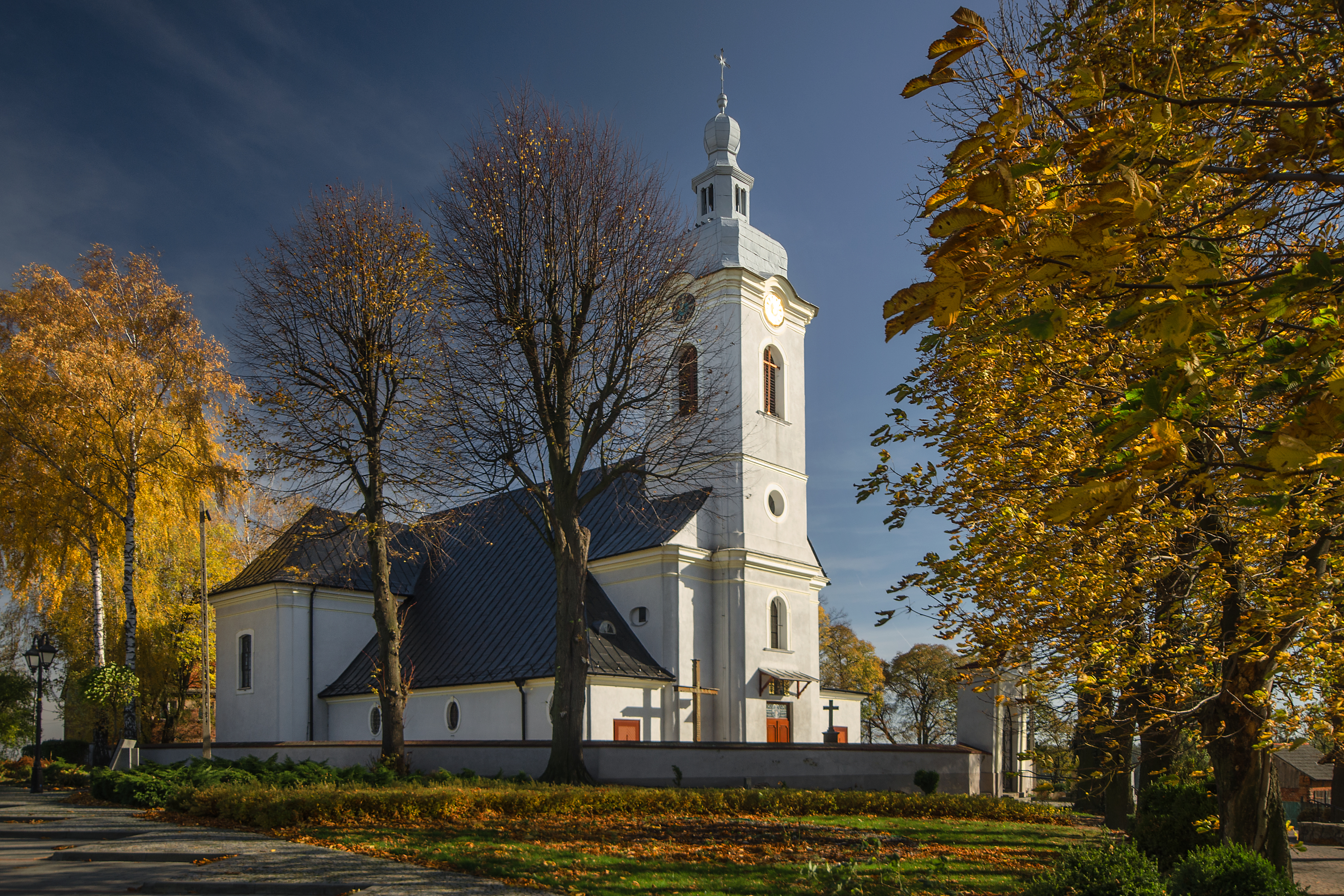 Pawłowiczki, kościół par. pw. Świętych Andrzeja i Jakuba, XVIII w.